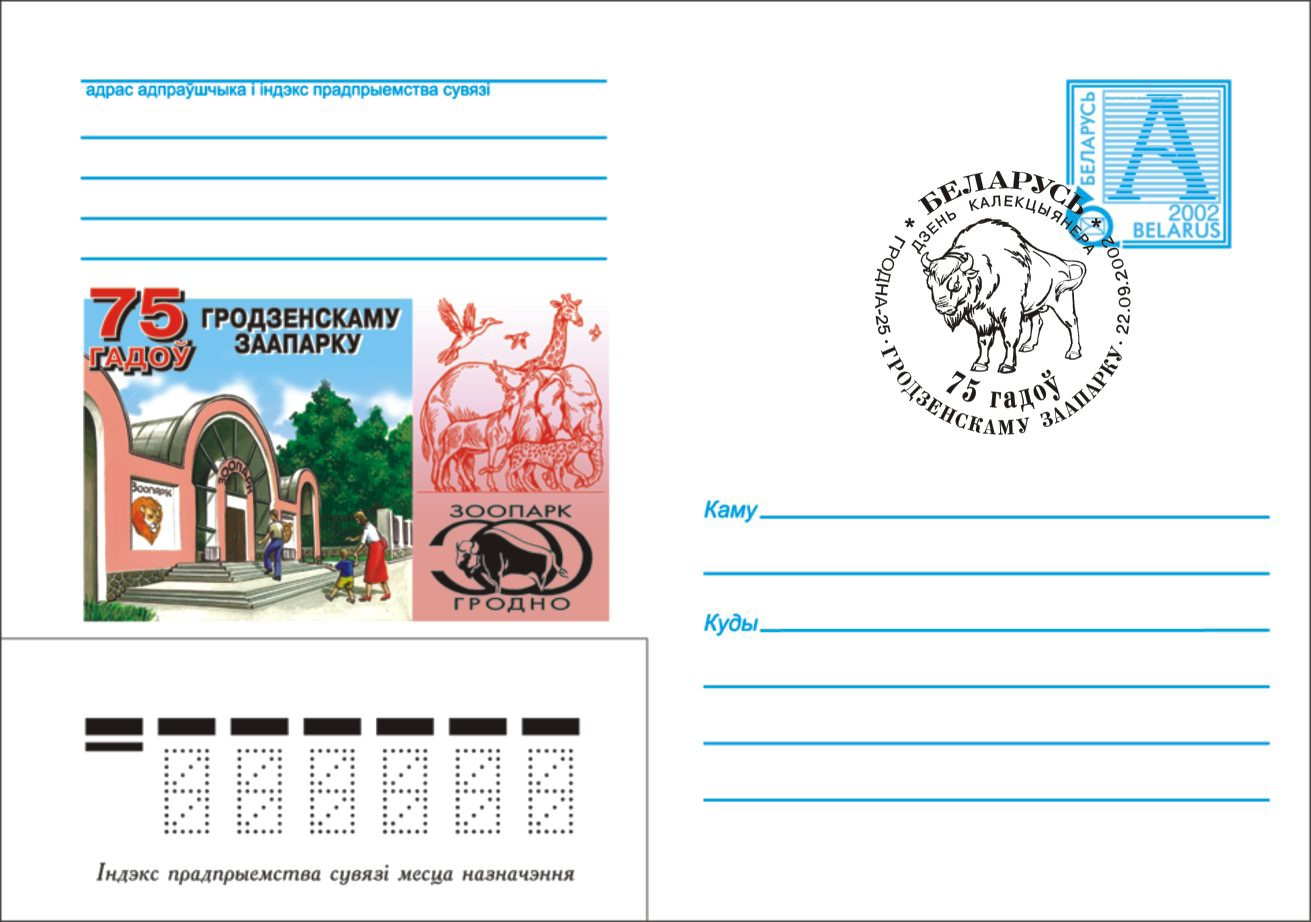 Художественный маркированный конверт со стандартной маркой и с памятным спецштепмелем (художник спецштепеля - Алексей Бушкин), выпущенный РО "Белпочта" к 75-летию Гродненского зоопарка.